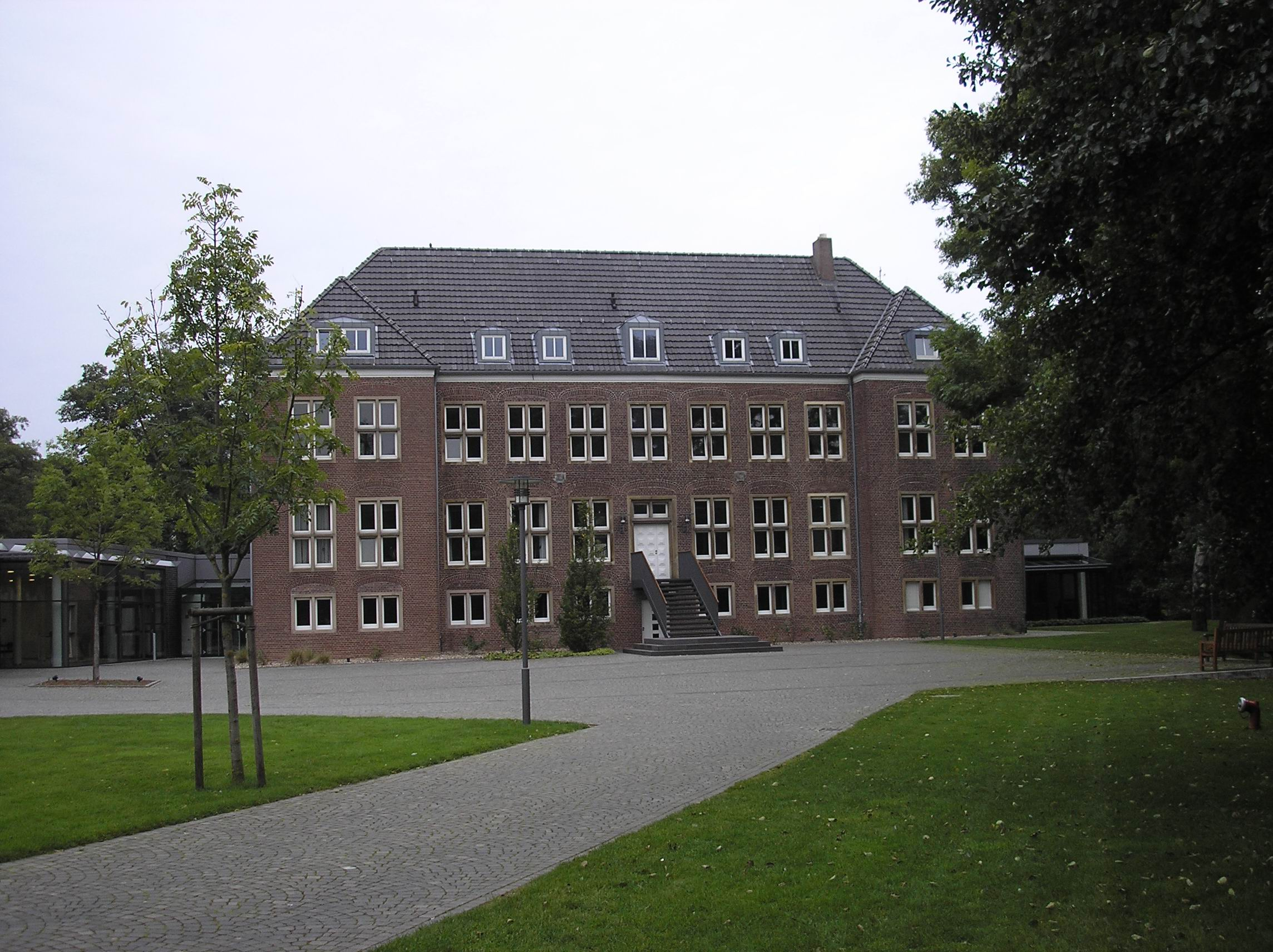 "Wasserburg" in Kleve-Rindern, alter Gebäudeteil